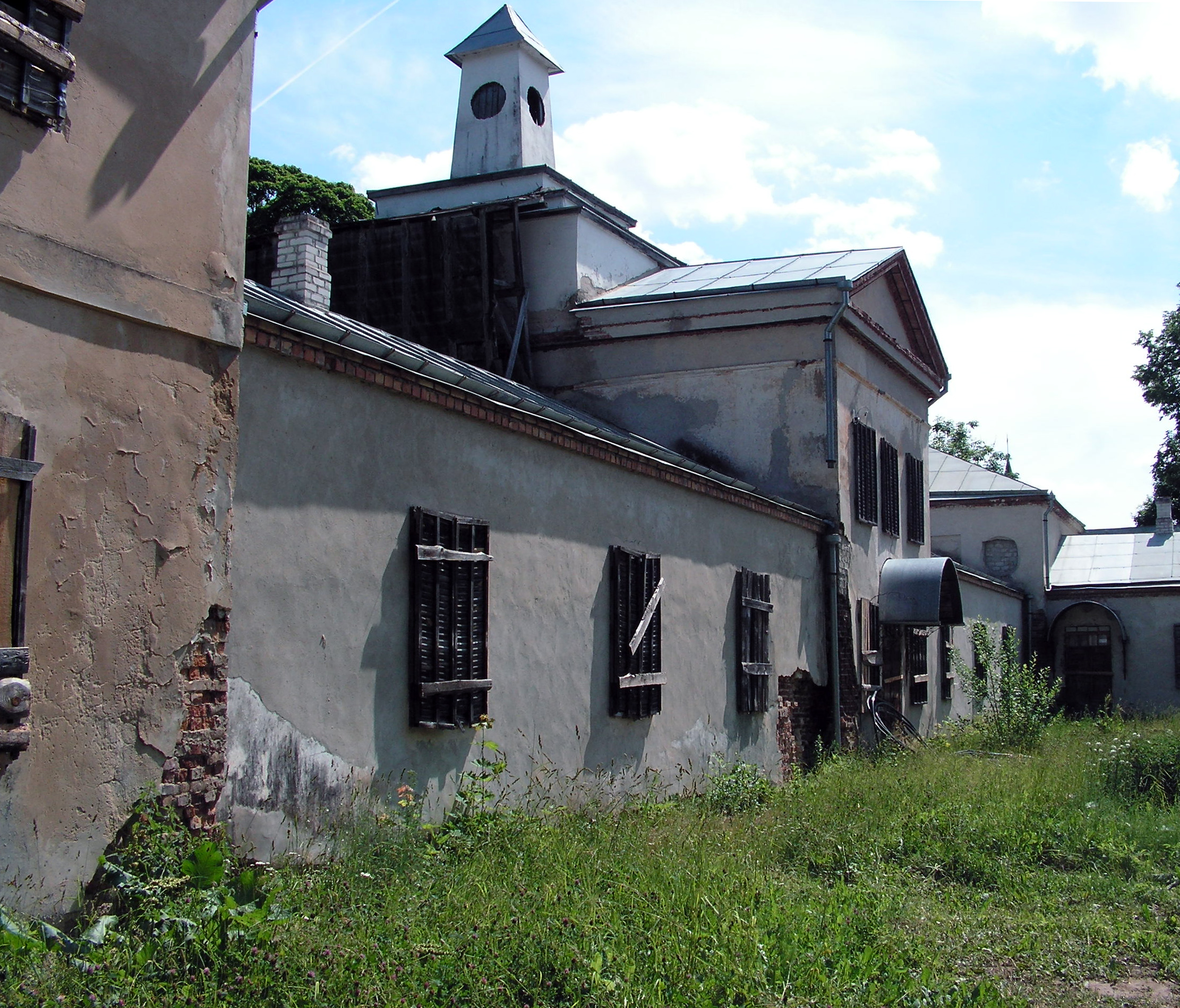 Беларуская (тарашкевіца): Сядзіба Міхала Клеафаса Агінскага ў Залесьсі (Смаргонскі раён). Лета 2011